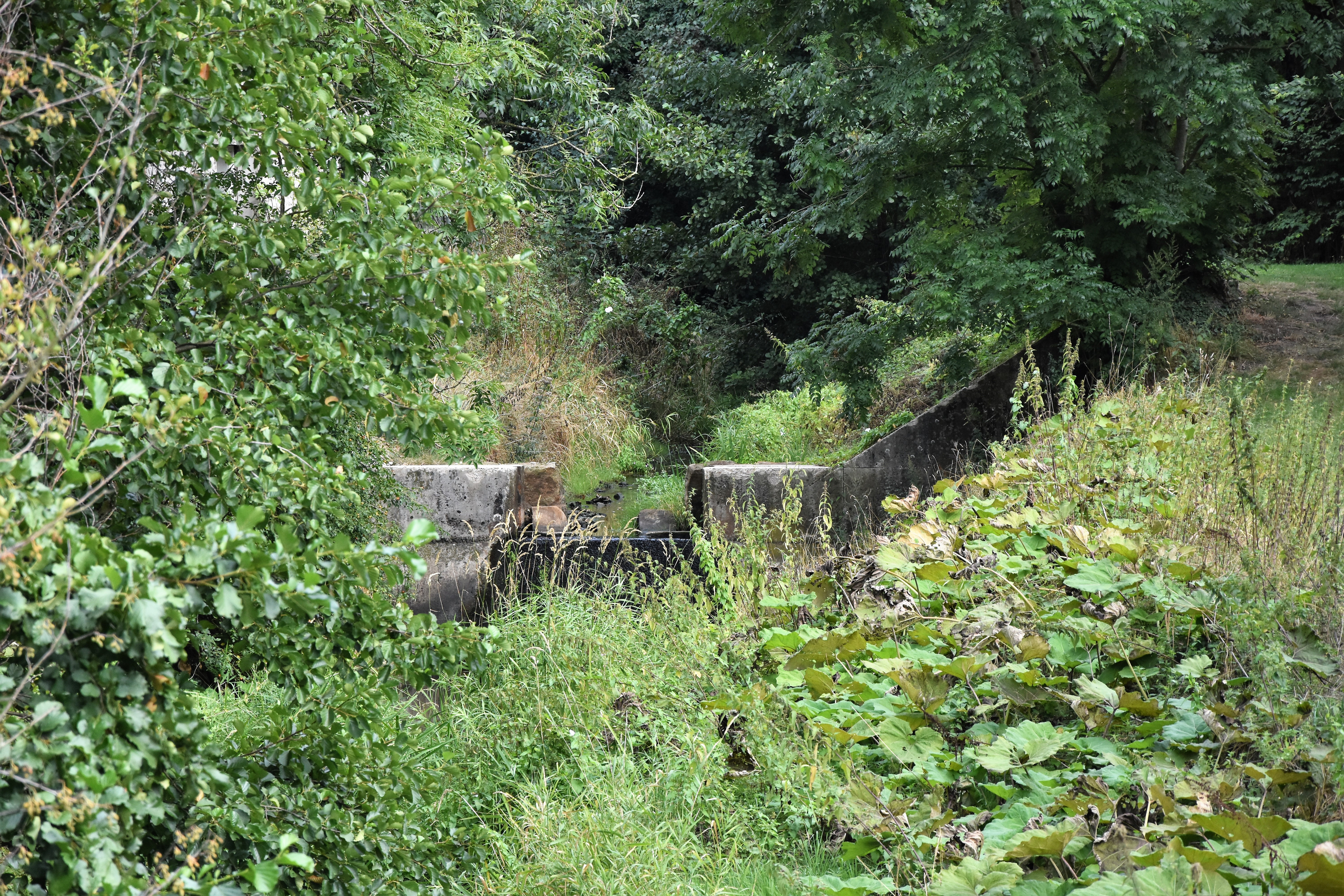 Trockengefallenes Wehr der Hopstener Aa an der alten Zichorienfabrik. Das Restwasser der Hopstener Aa läuft über die Giegel Aa ab. Es befindet sich nur noch stehendes Wasser im Flussbett der kleinen Hopstener Aa.